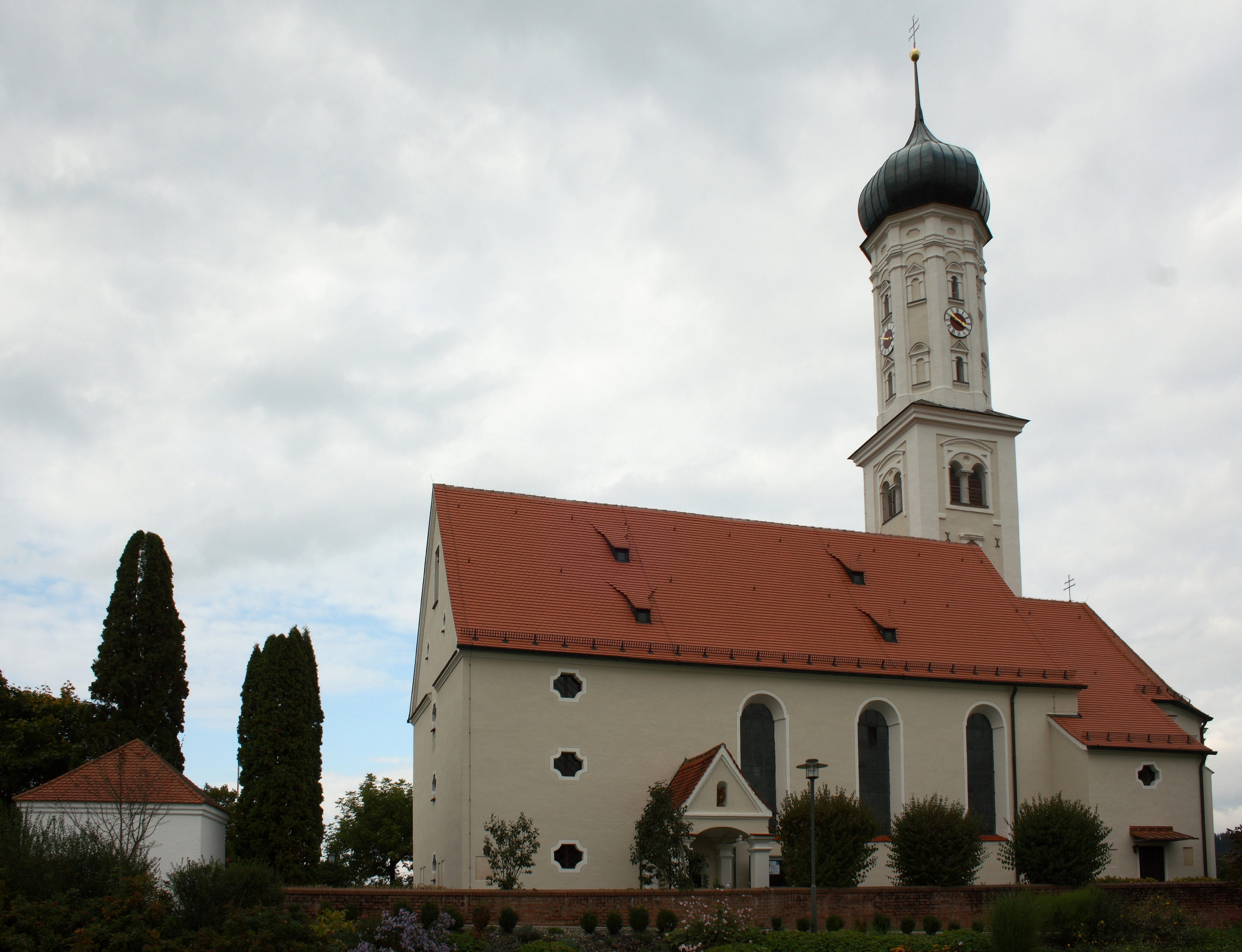 Katholische Pfarrkirche St. Vitus in Altenmünster im Landkreis Augsburg (Bayern), Ansicht von Süden